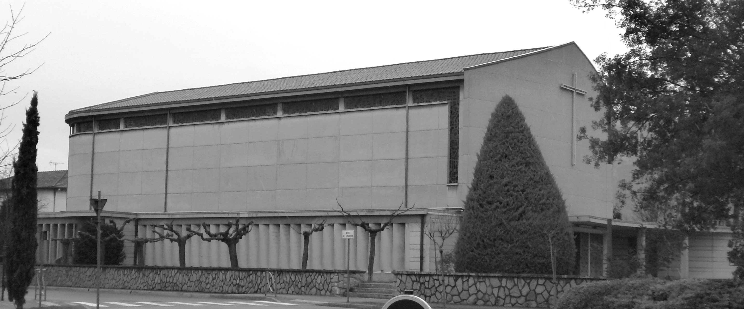 Eglise Sainte-Thérèse Guilherand-Granges, extérieur.